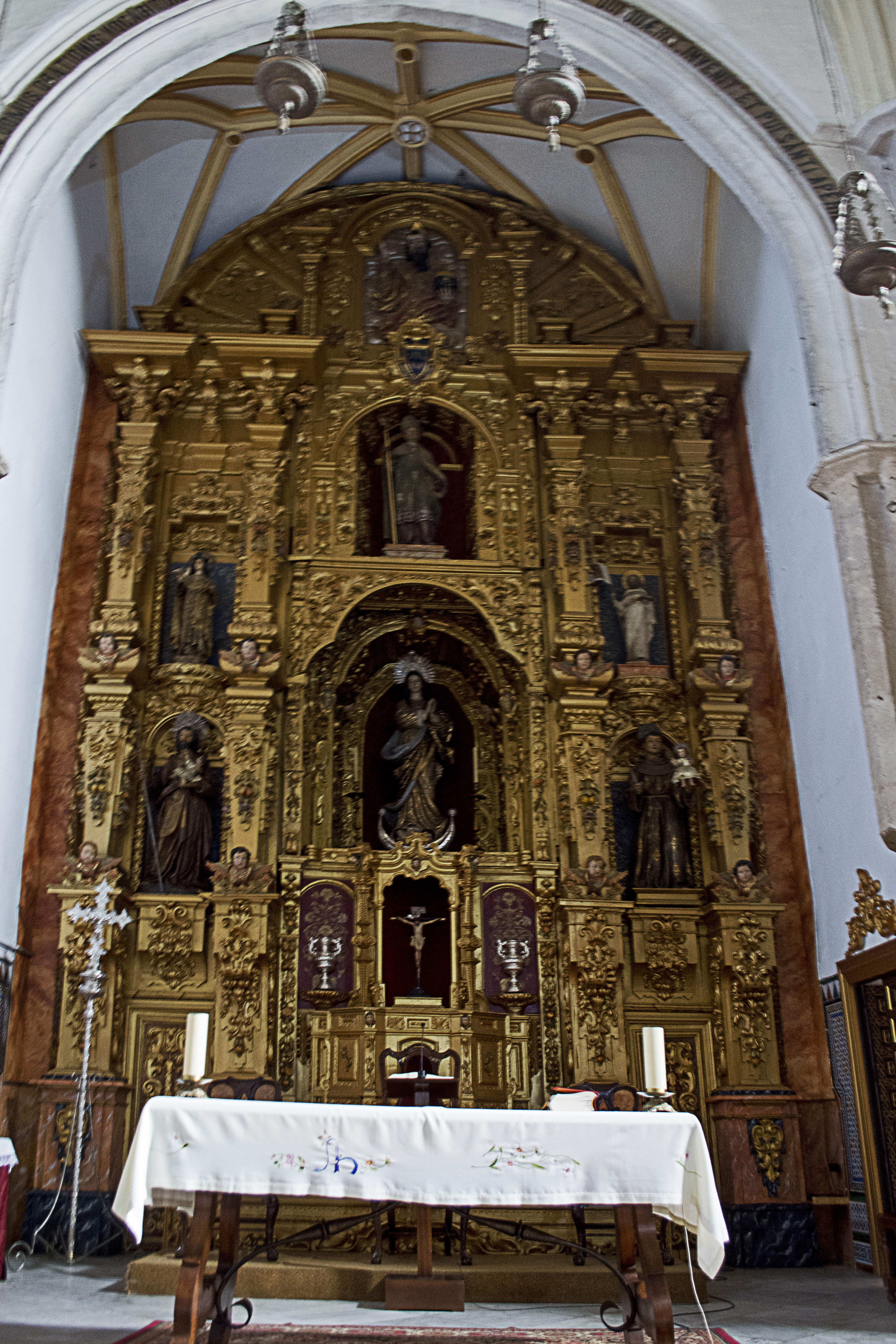 Altar mayor de la Iglesia de Nuestra Señora de la Asunción en Lora del Río, provincia de Sevilla (España)